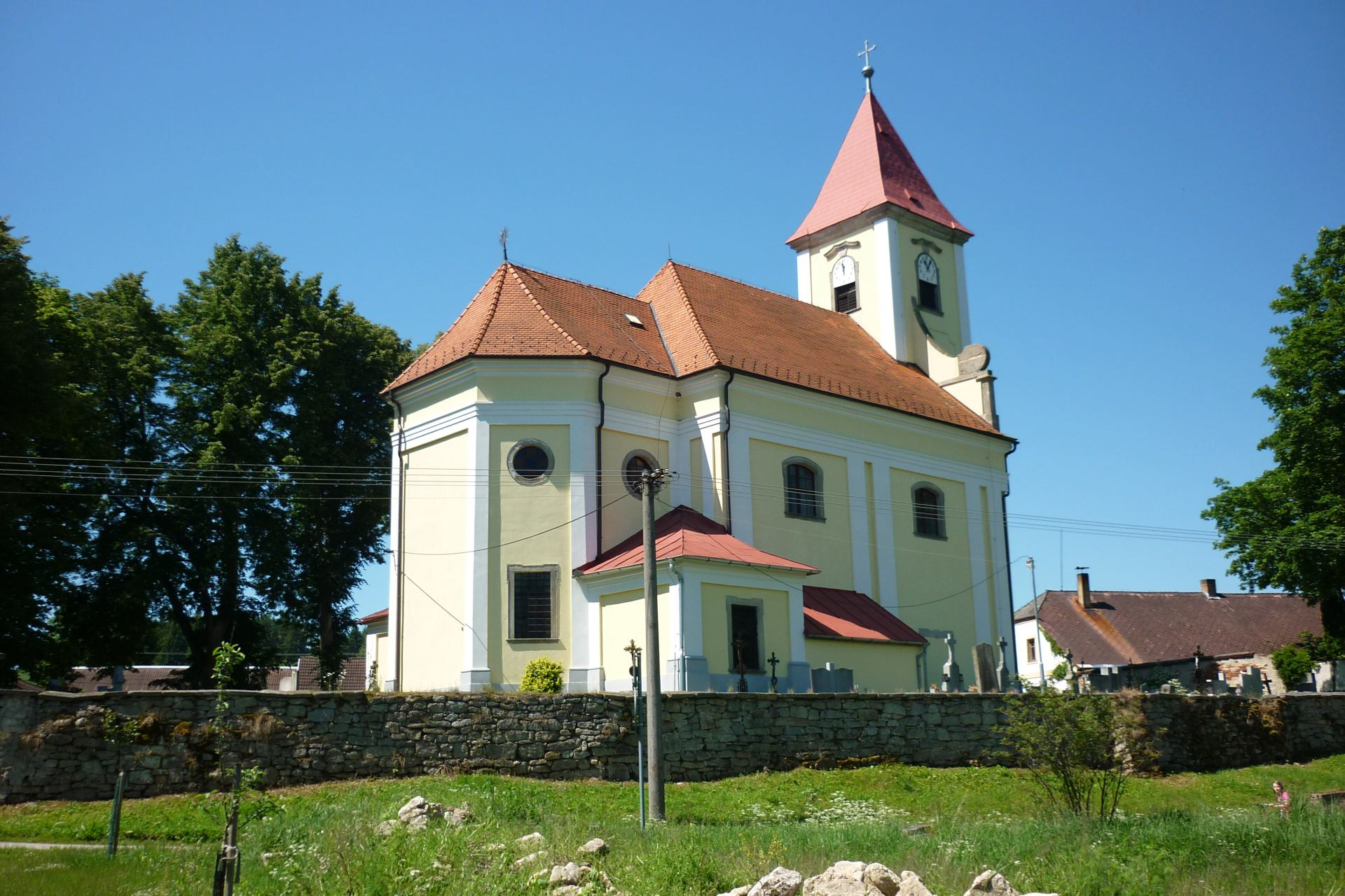 Matějovec - Kostel sv. Oldřicha a Linharta - jednolodní barokní kostel z poloviny 18. století, postaven majitelem Rudolce Františkem Alexandrem Hartlem